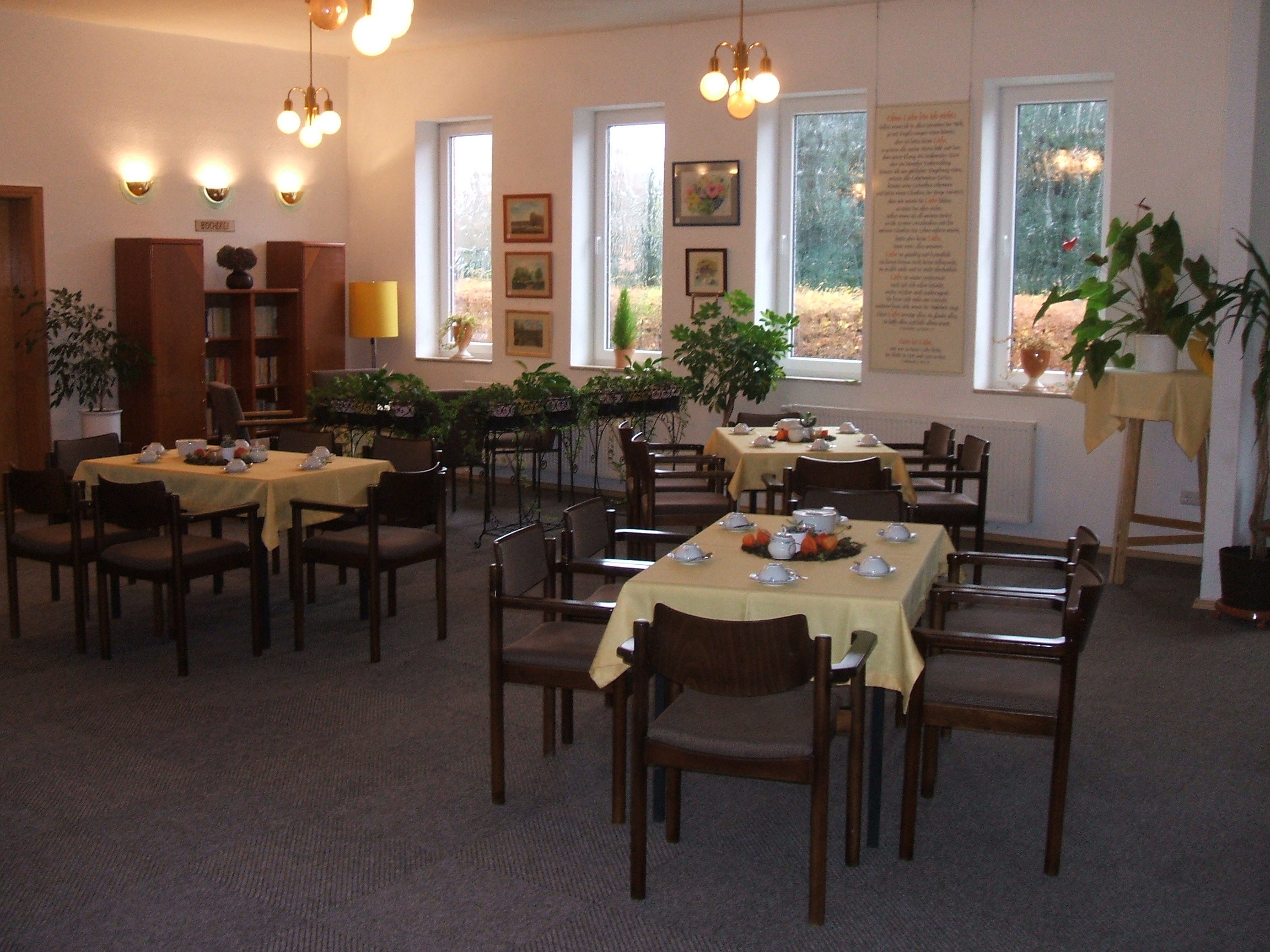 Foyer der Baptistenkapelle Moorhusen